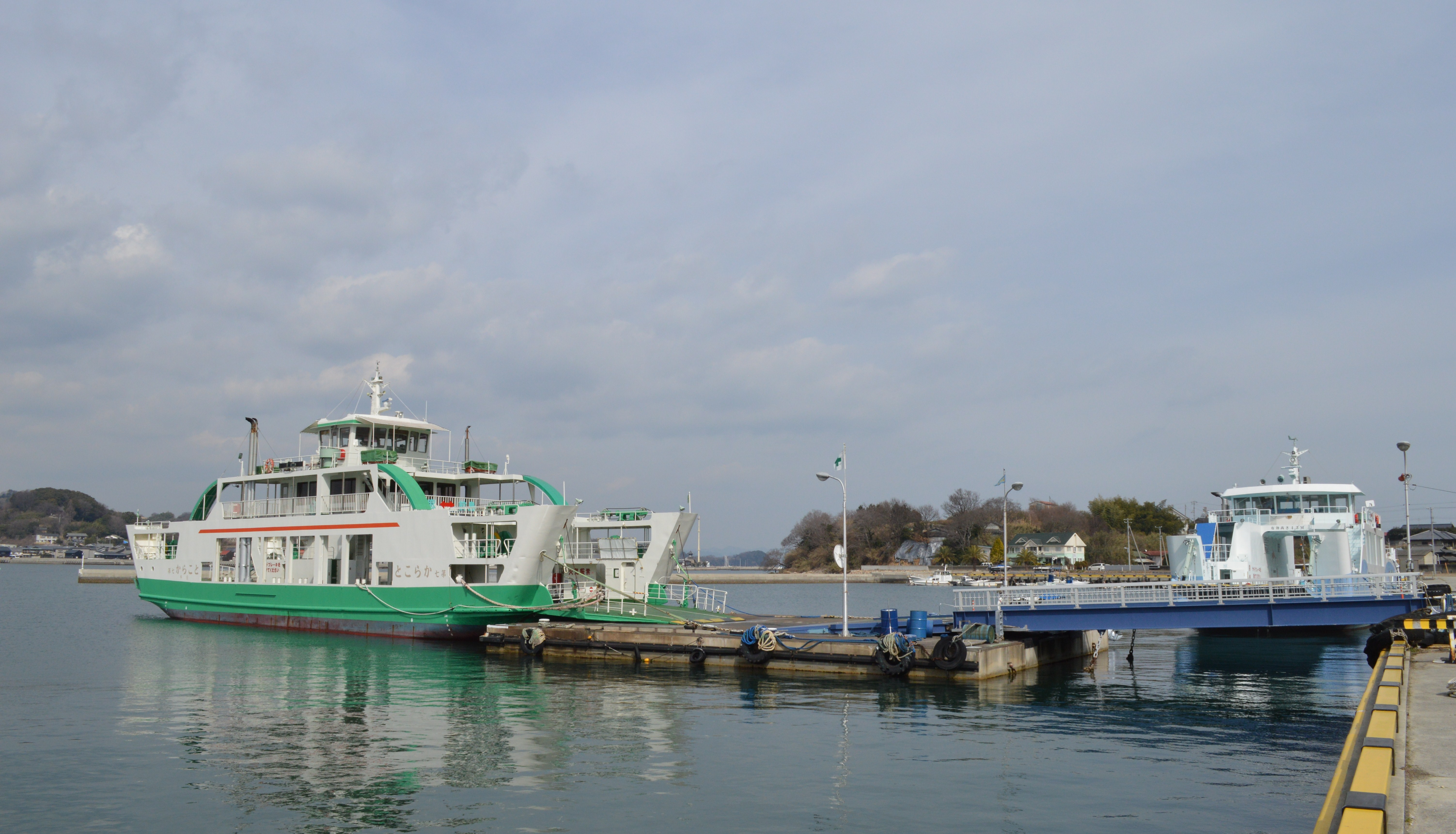 岡山県瀬戸内市牛窓町の牛窓港と前島を結ぶ前島フェリー。1993年進水の「第7からこと」（左/緑）と2013年進水の「まえじま丸」（右/青）。